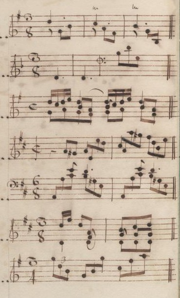 Table du volume X des manuscrits de Venise (incipit des sonates 8 à 14, K. 425 à 231).